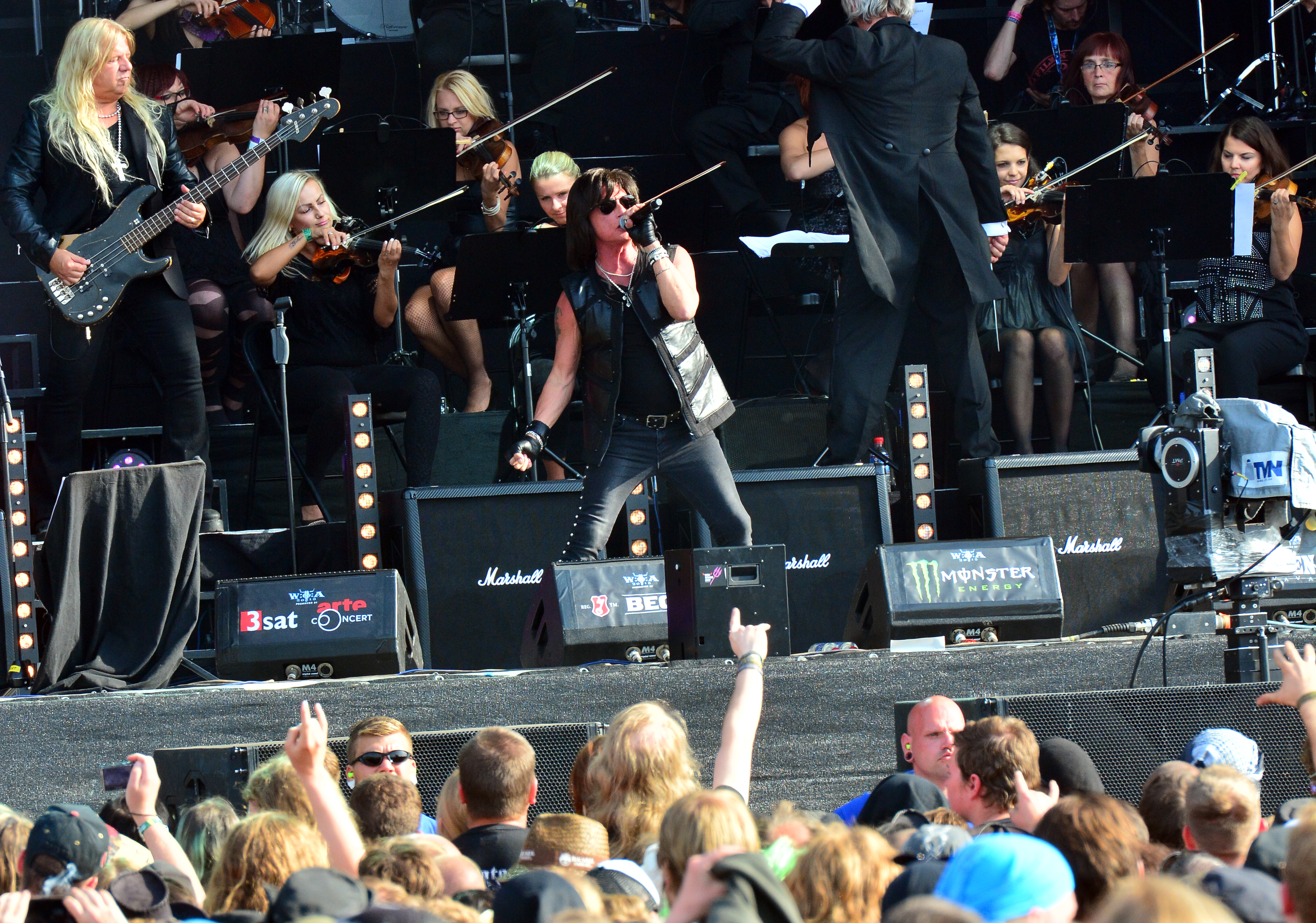 Rock meets classic mit Joe Lynn Turner beim Wacken Open Air 2015